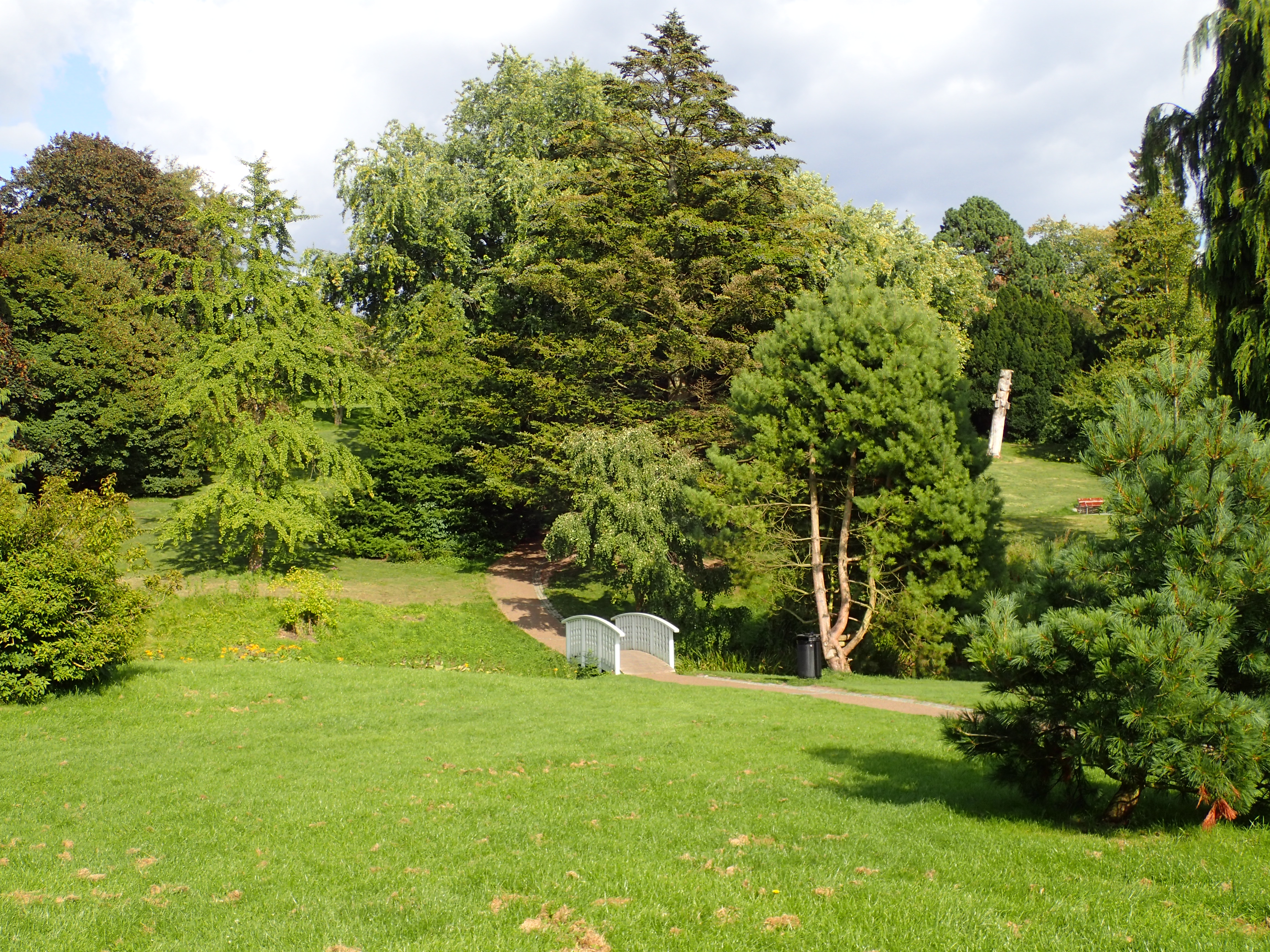 Botanisk Have i Aarhus